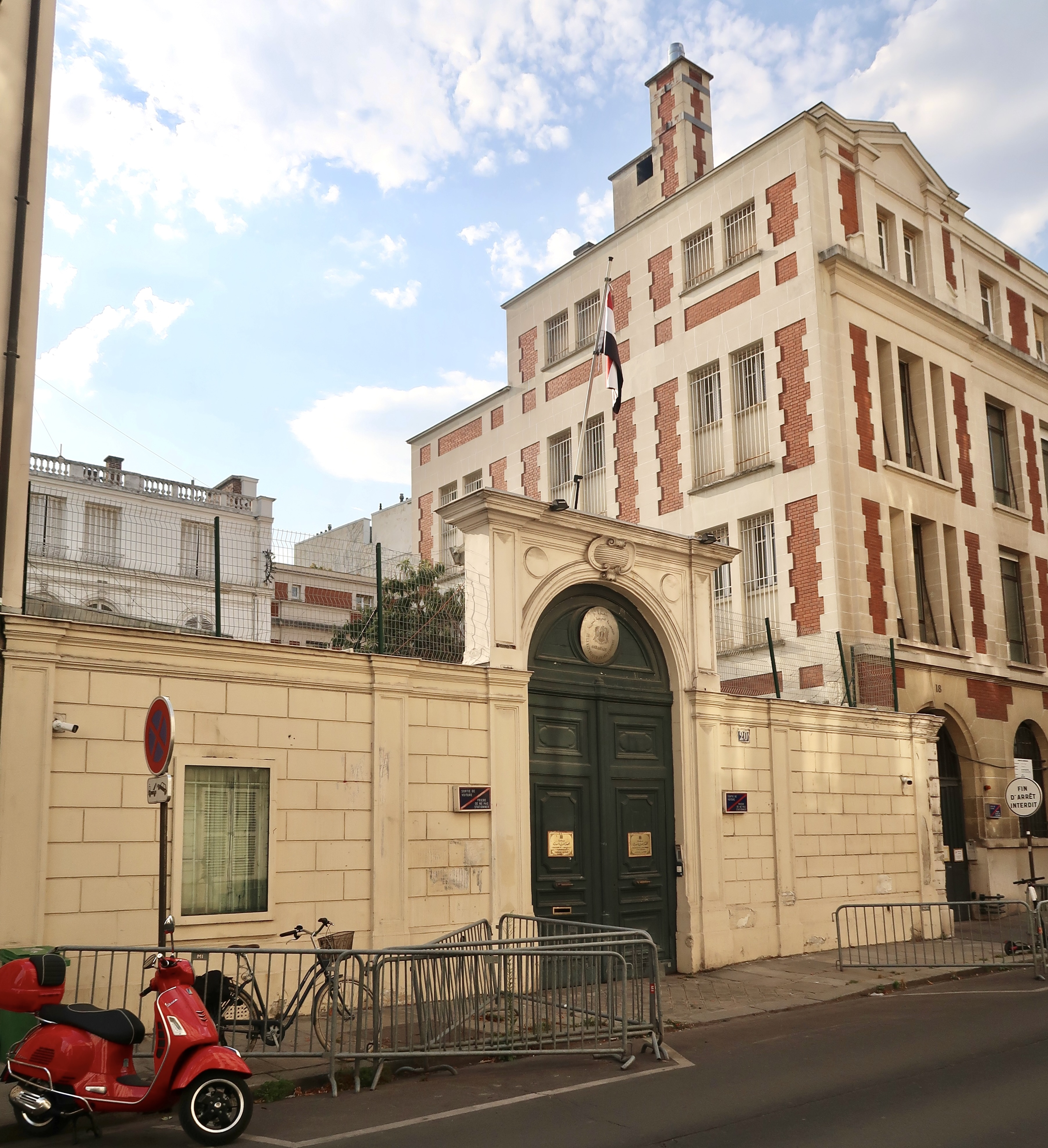 Ambassade de Syrie en France, 20 rue Vaneau (Paris, 7e).